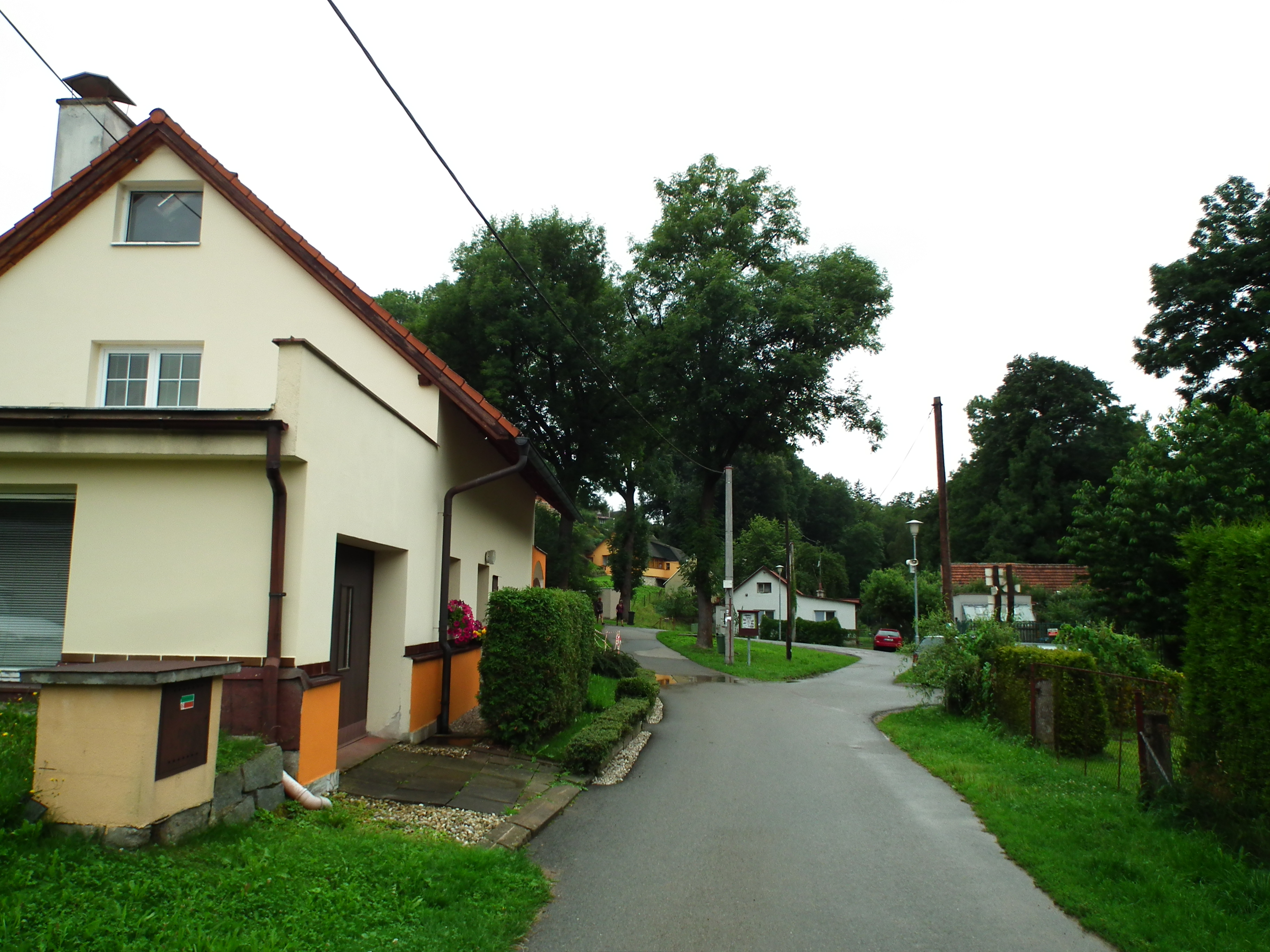 Oldrichovice - część Ujścia nad Orlicą.